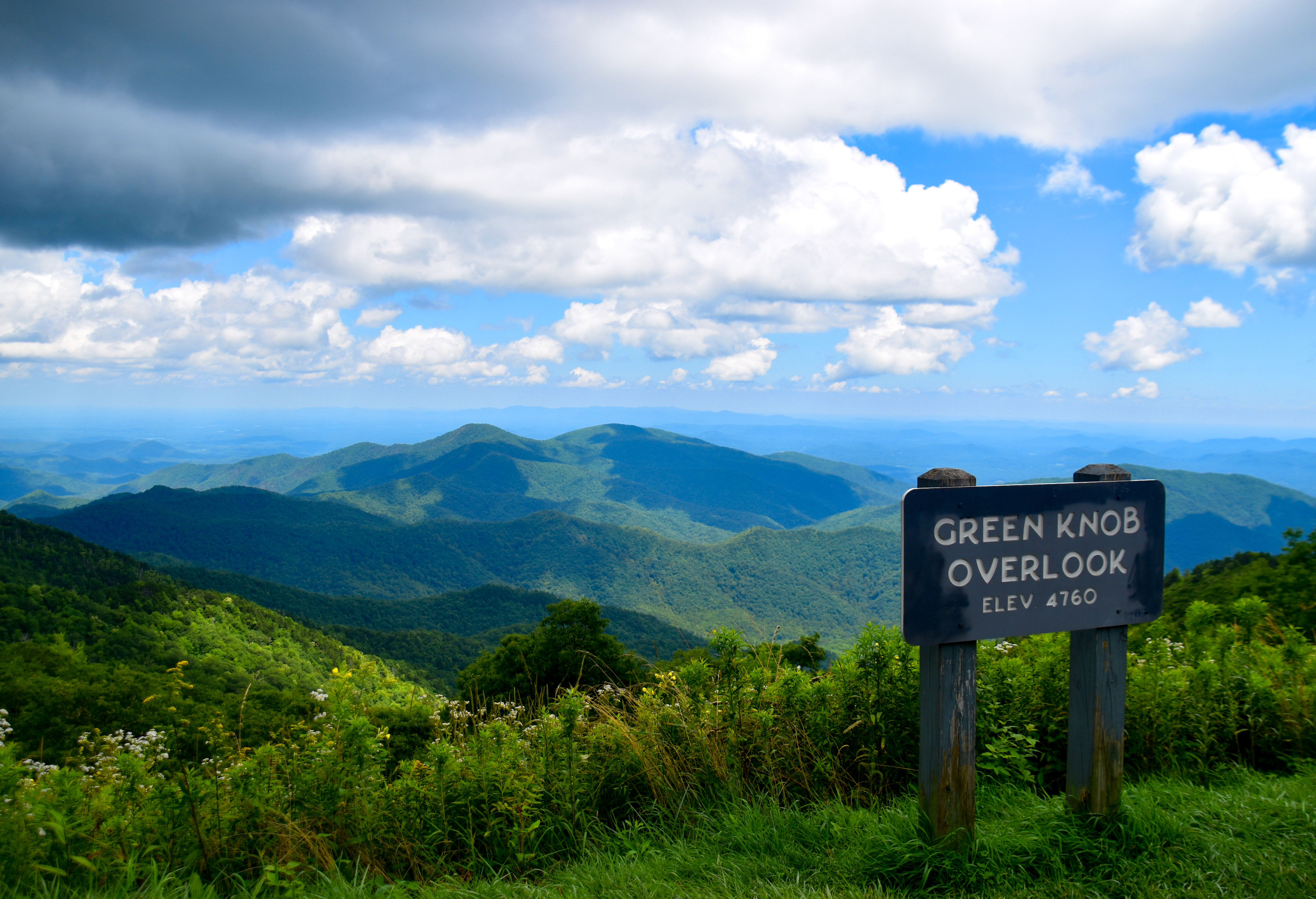 Green Knob Overlook -- Blue Ridge Parkway (NC)